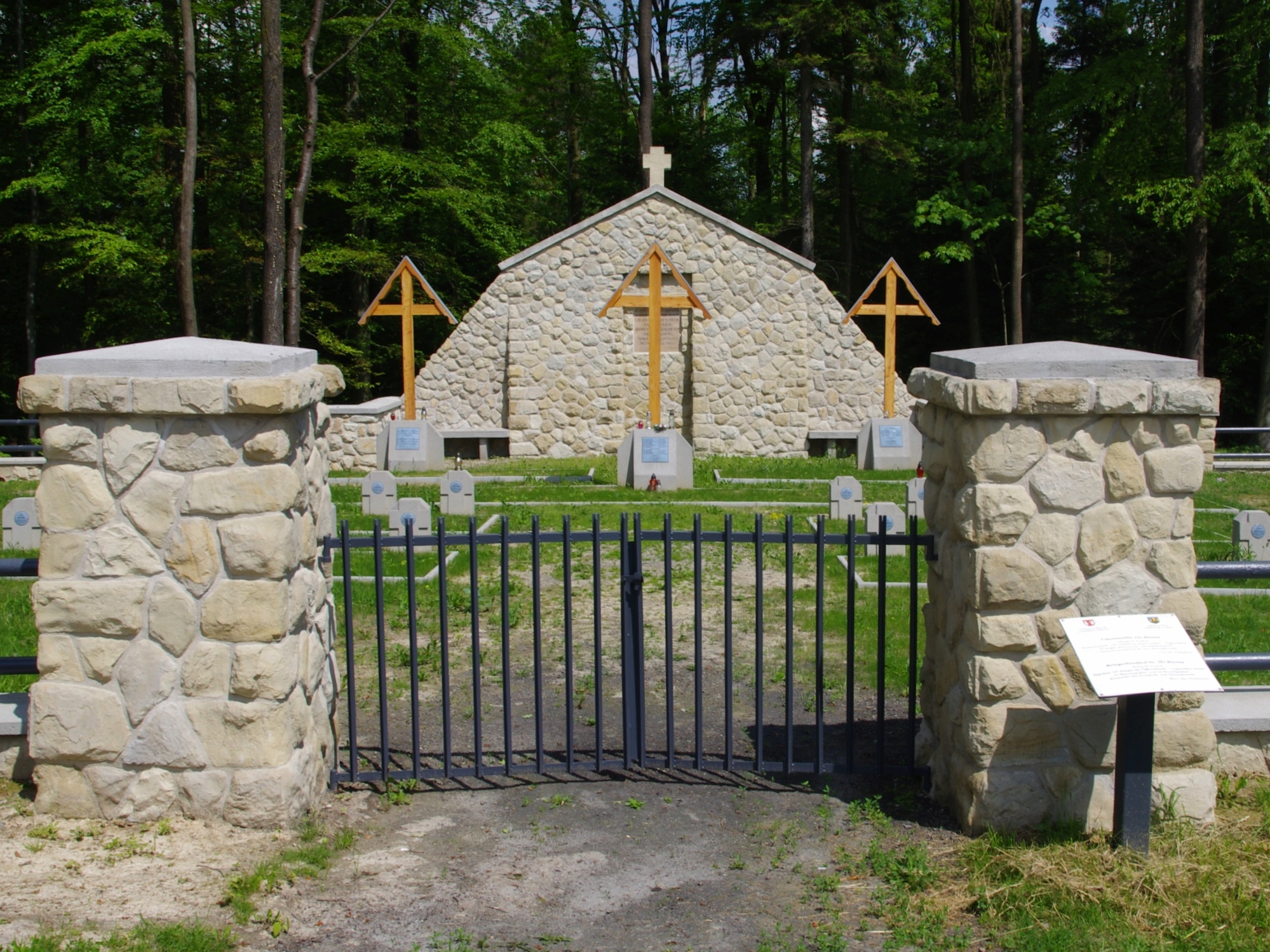 Cmentarz wojenny nr 121 Biesna